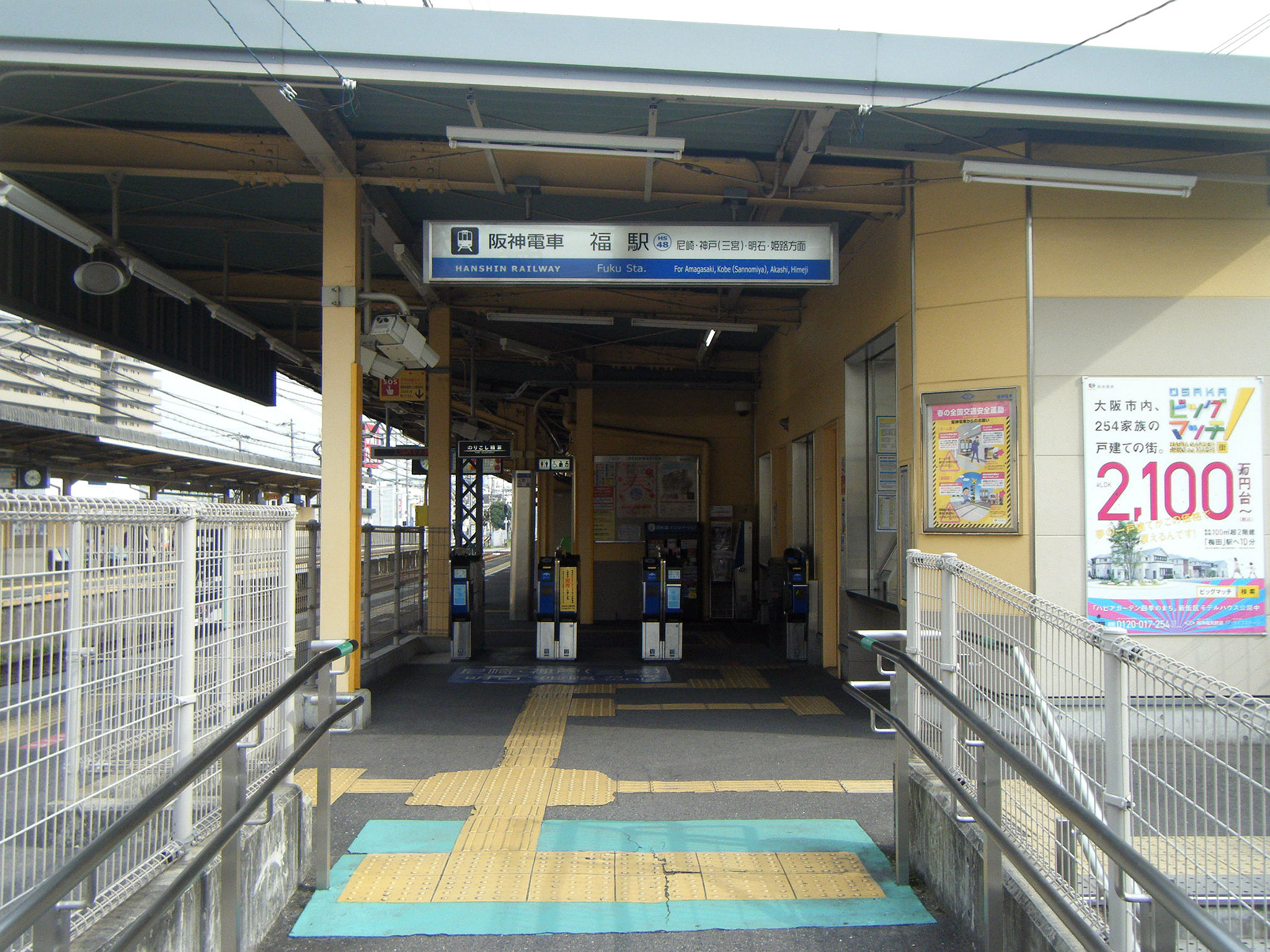 阪神なんば線 福駅 下り改札口